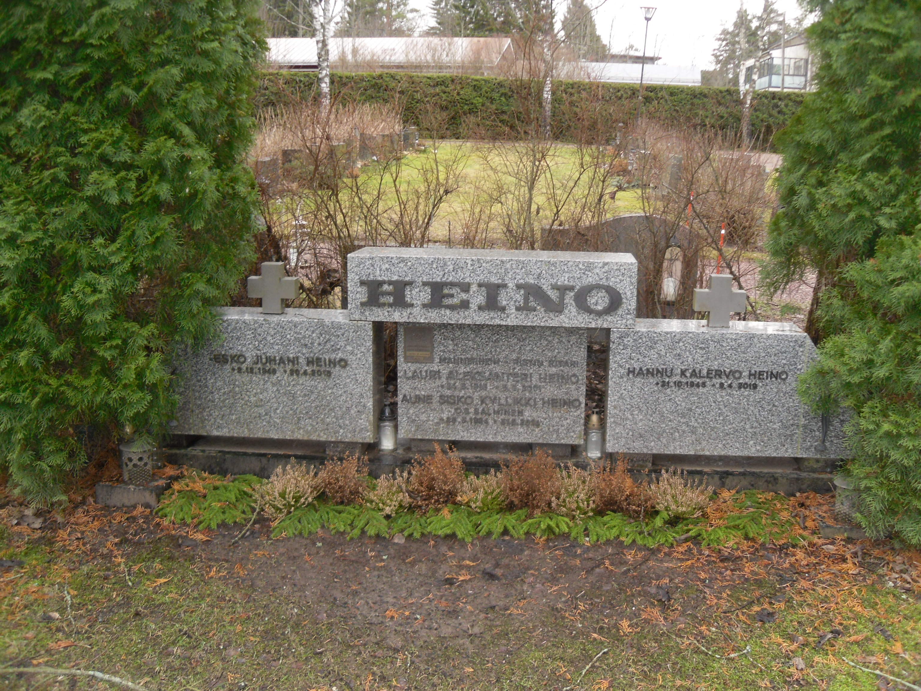 Mannerheim-ristin ritari Lauri A Heinon hautamuistomerkki Someron hautausmaalla.